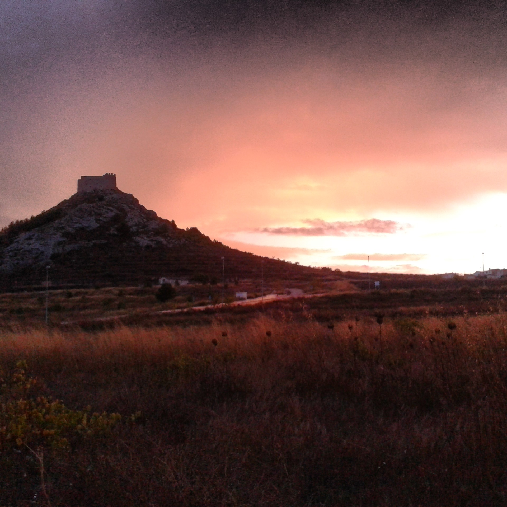 castillo de castalla